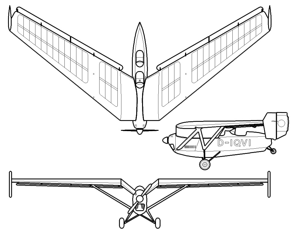 Gotha Go147